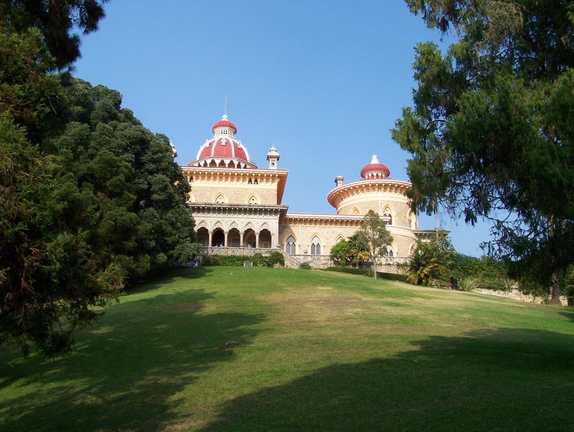 Palácio de Monserrate. Sintra, Portugal.